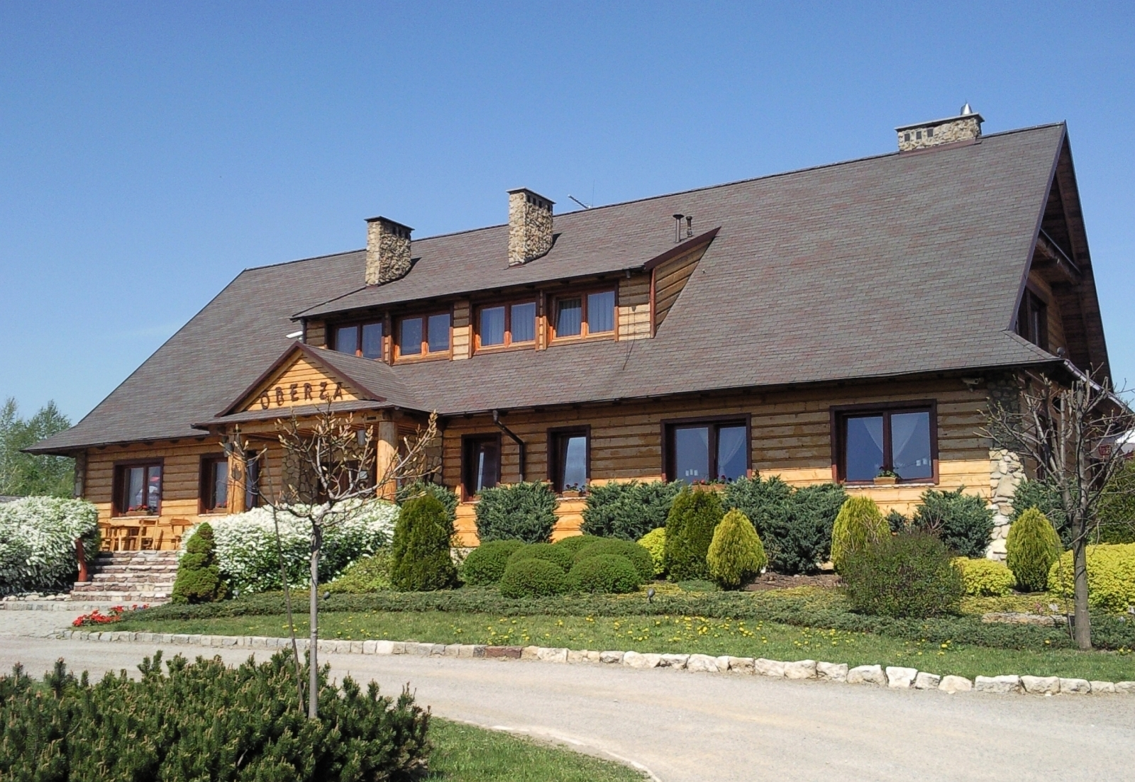 Niedawno wybudowana oberża przy drodze krajowej nr 4.